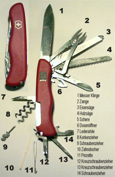 Victorinox Workchamp ( Work Champ ) Grosse Variante mit feststellbarer Klinge